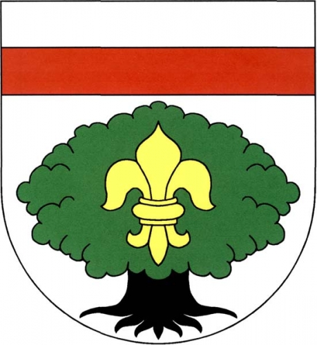 znak, Staré Buky, okres Trutnov